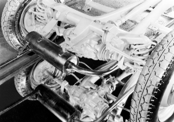 Bildbeschreibung: Typ 170 V, Zweigelenk-Pendelachse, 1936-1952 Quelle: Mediaseite der DaimlerChryslerAG Genehmigung: Gern können Sie für Ihre Tätigkeit für die Wikipedia Inhalte der DaimlerChrysler Medienseiten verwenden. Dazu erkennen wir die Bedingungen nach GNU-FDL an. Das Angebot bezieht sich auch auf die vorhandenen Bilder.(Dr.Josef Ernst, Communications, DaimlerChrysler AG)